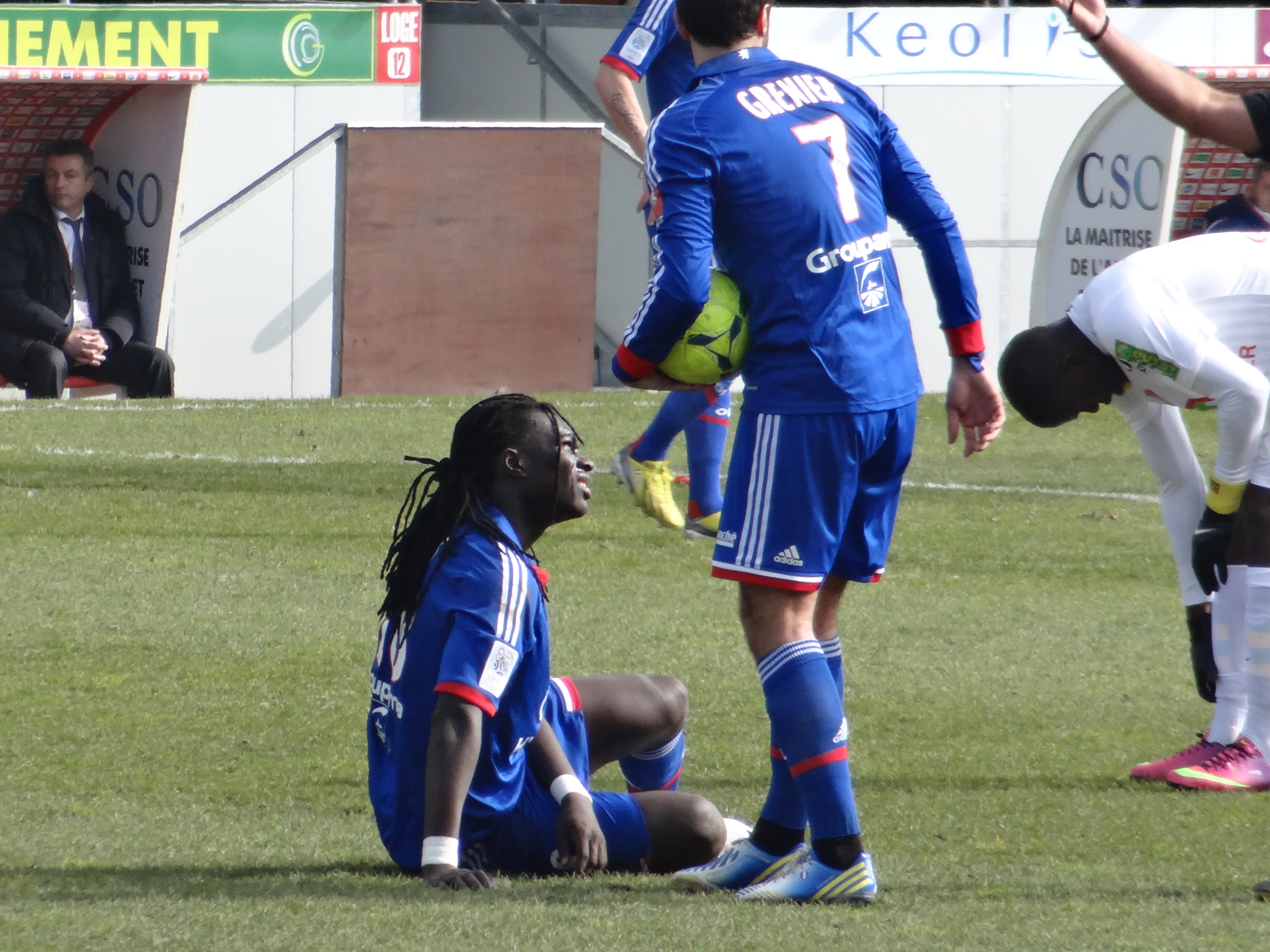 Match de football (Ligue 1) entre le Stade brestois 29 et l'Olympique lyonnais, le 3 mars 2013